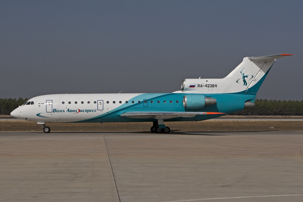 RA-42384 Yak42D Volga Avia Express